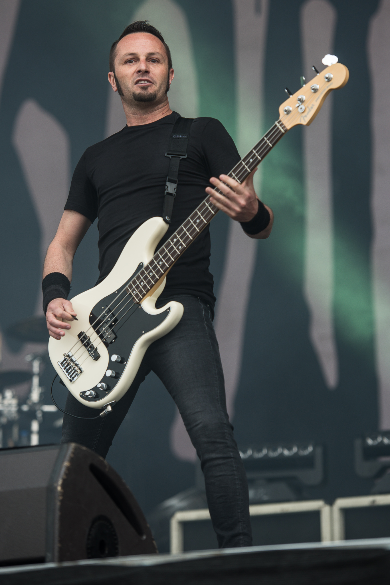 ARGO-Konzerte,Gojira,Jean Michel Labadie,Konzert,Livekonzert,Livemusik,Musik,RiP,Rock im Park 2017,Zeppelin Stage